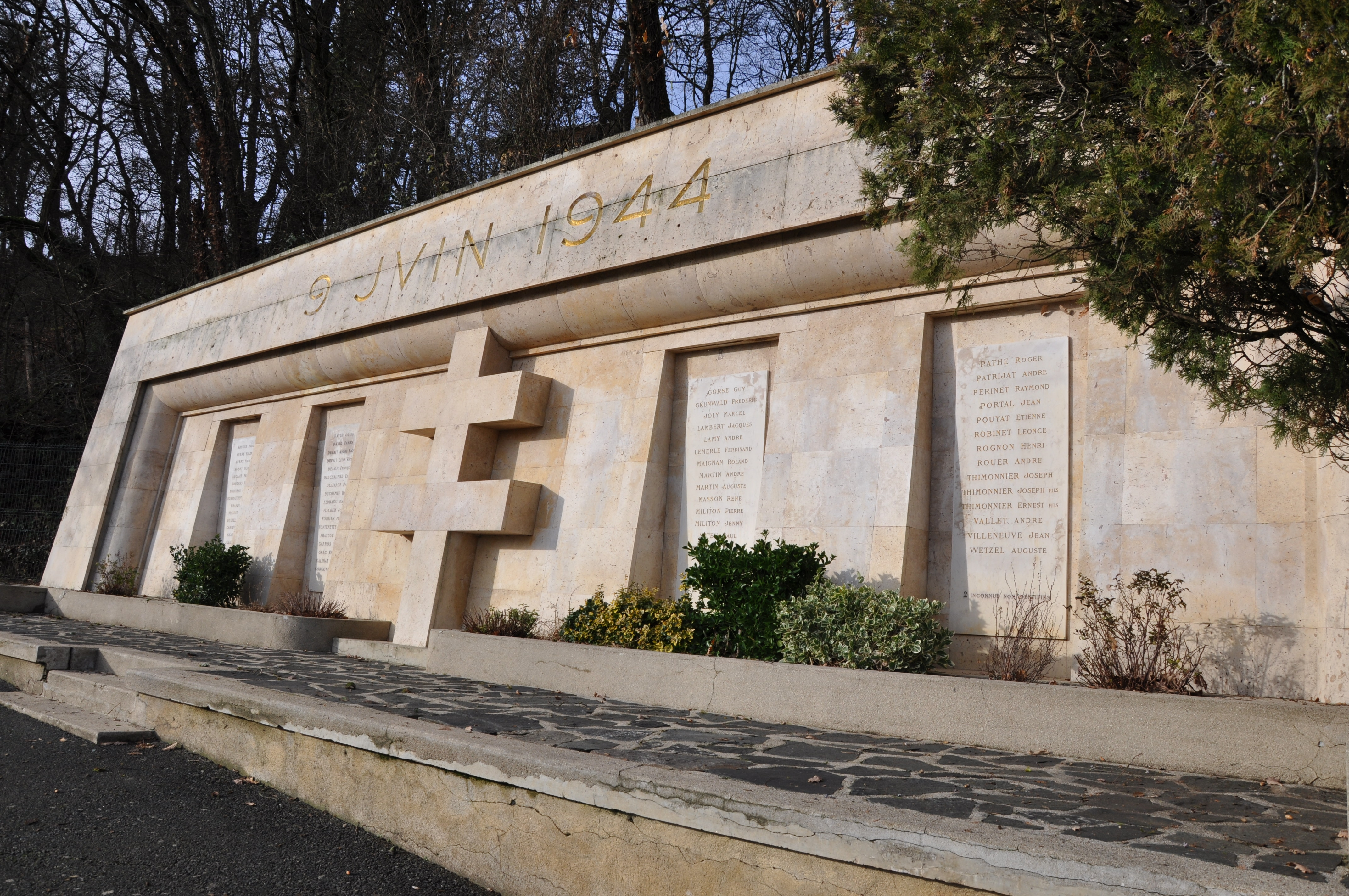 Mémorial d'Argenton-sur-Creuse (Indre)